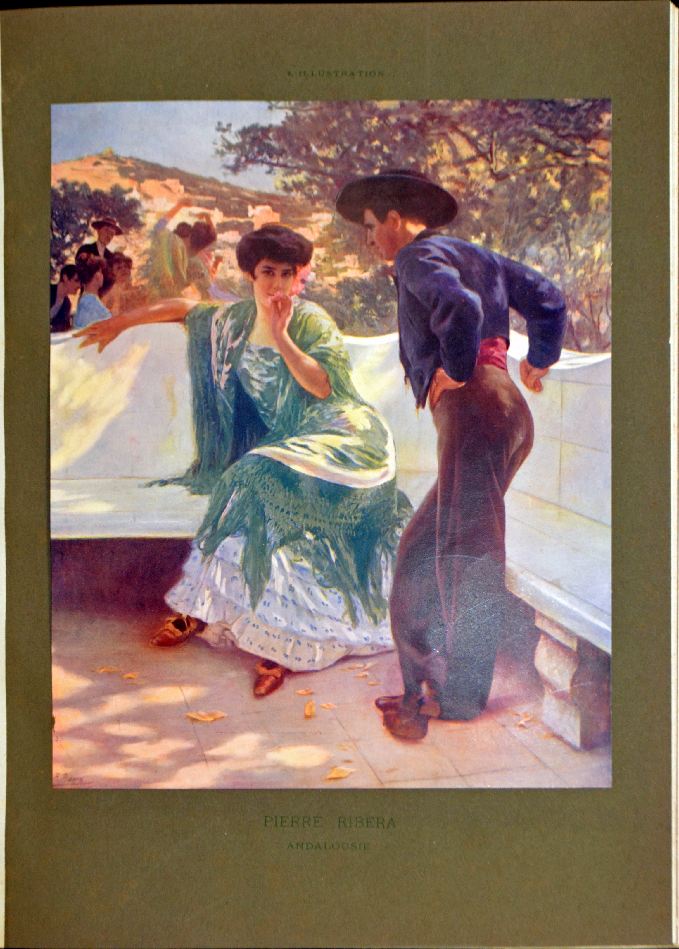 L'Illustration - Noël 1907